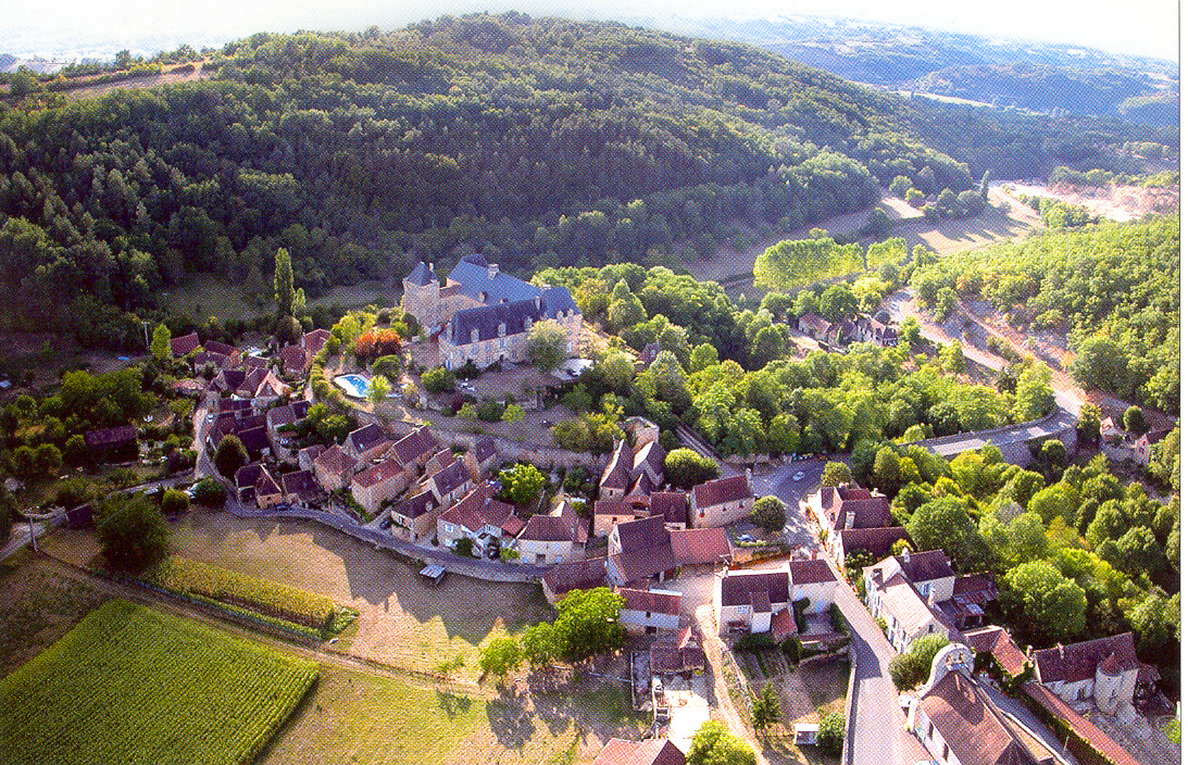 Vue aérienne du village de Berbiguières